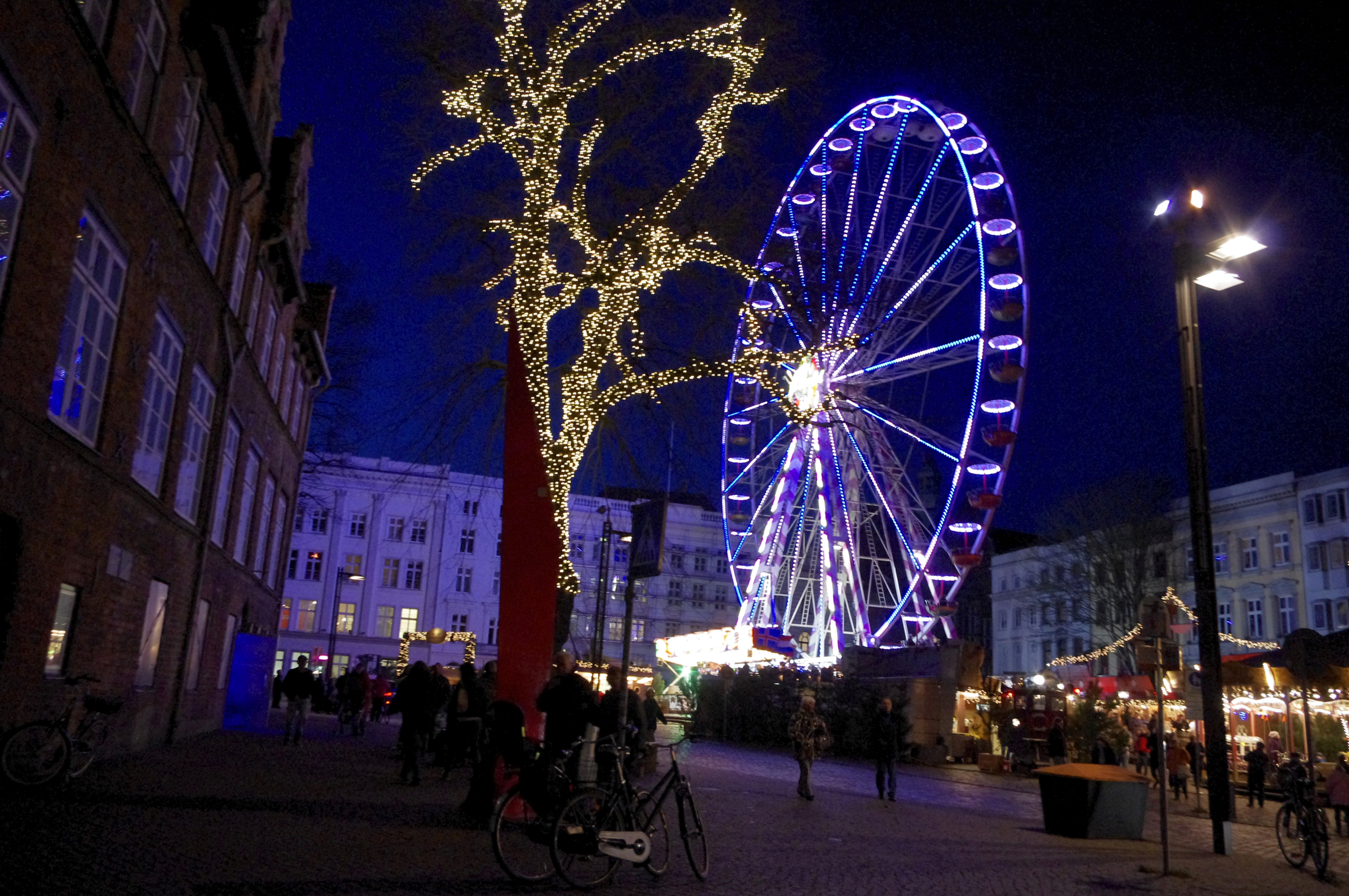 Koberg mit Riesenrad am Abend, Lübeck während des Weihnachtsmarktes 2011.